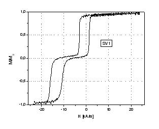 Zawór spinowy - histereza magnetyczna